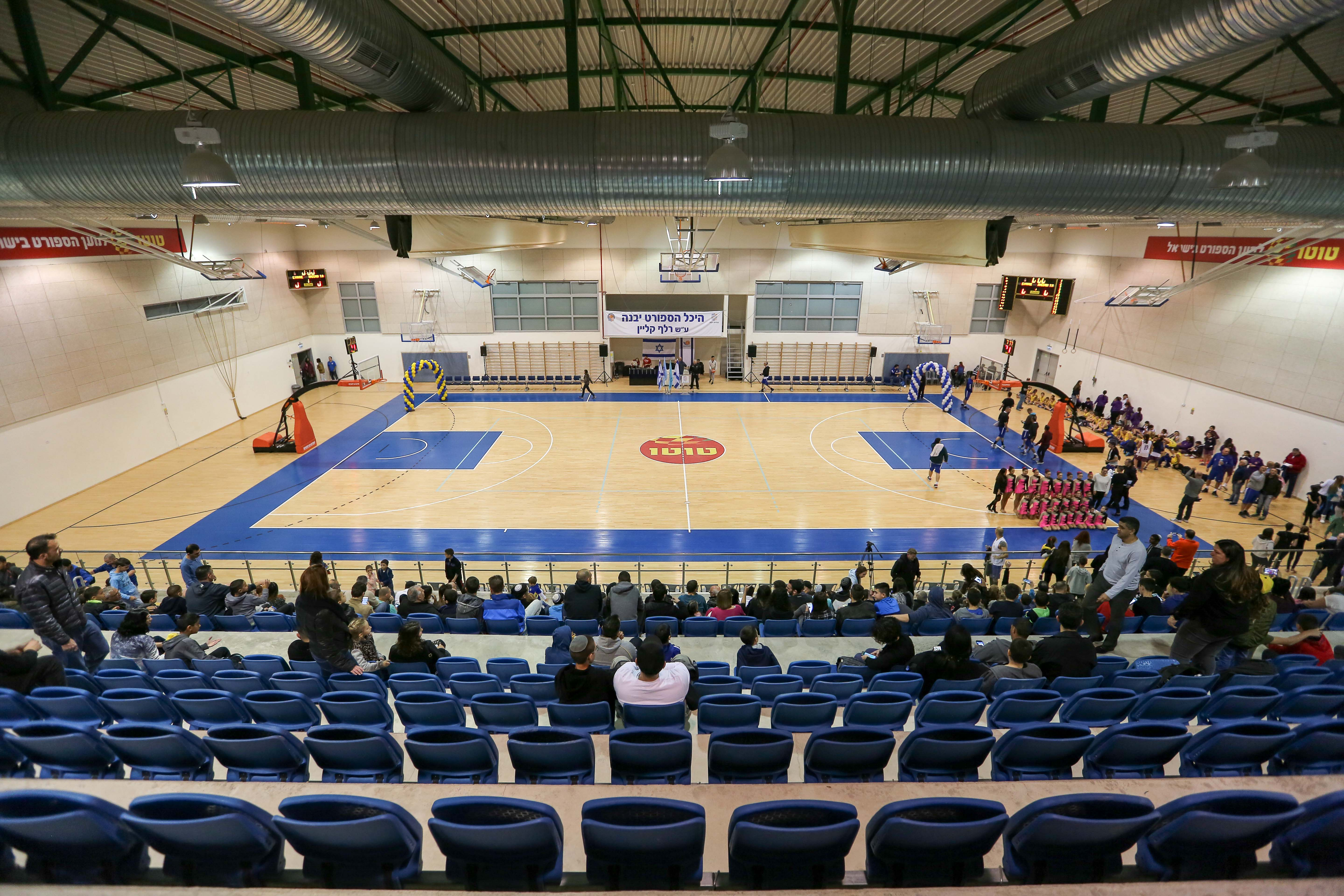 היכל הספורט ביבנה